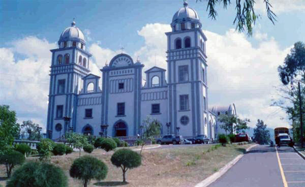 Suyapa Sanctuary in Tegucigalpa, Honduras